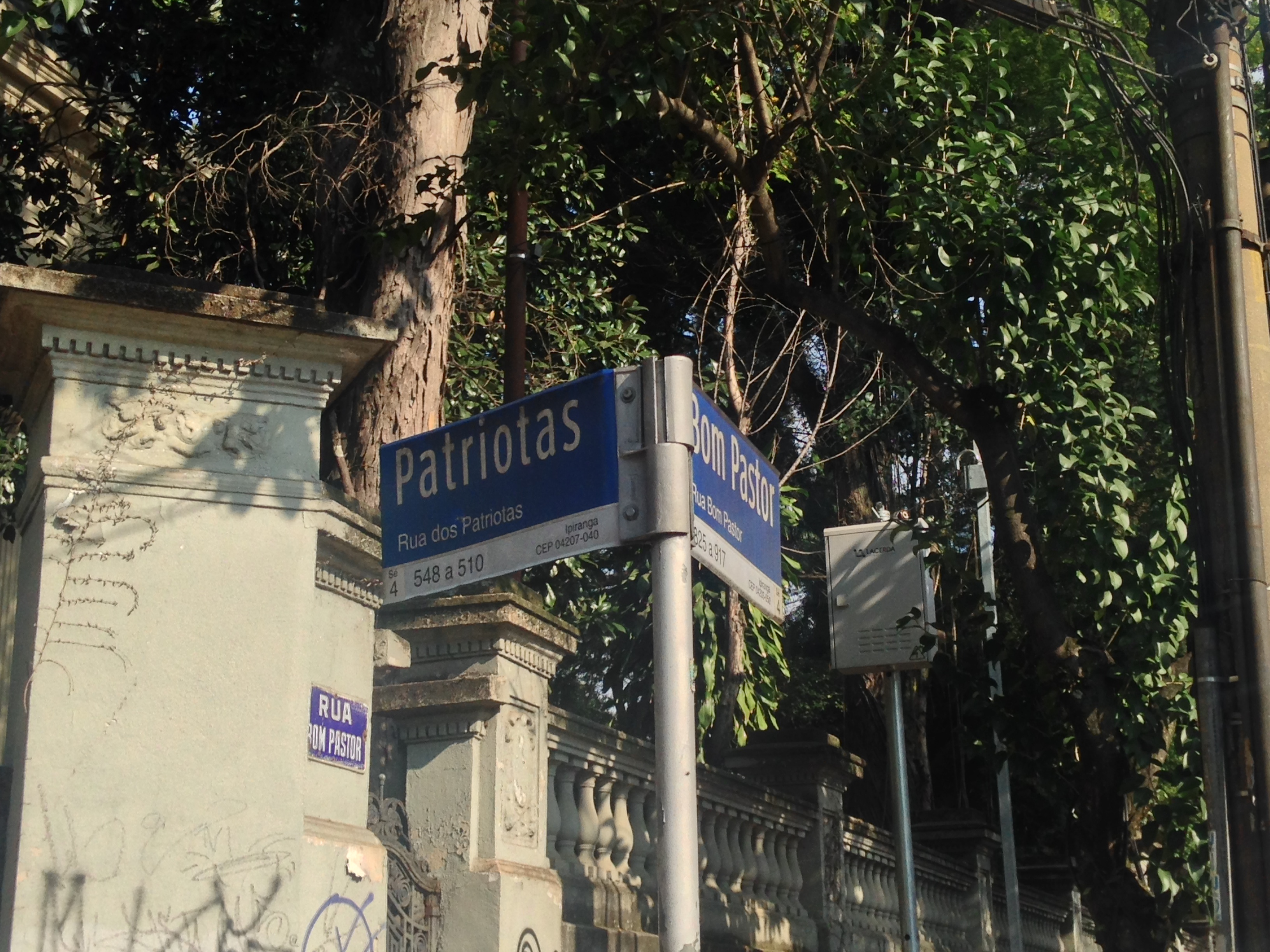 Vista da esquina da Rua Bom Pastor e Rua dos Patriotas, onde se encontra a Residência da Família Jafet, em São Paulo (SP), Brasil.